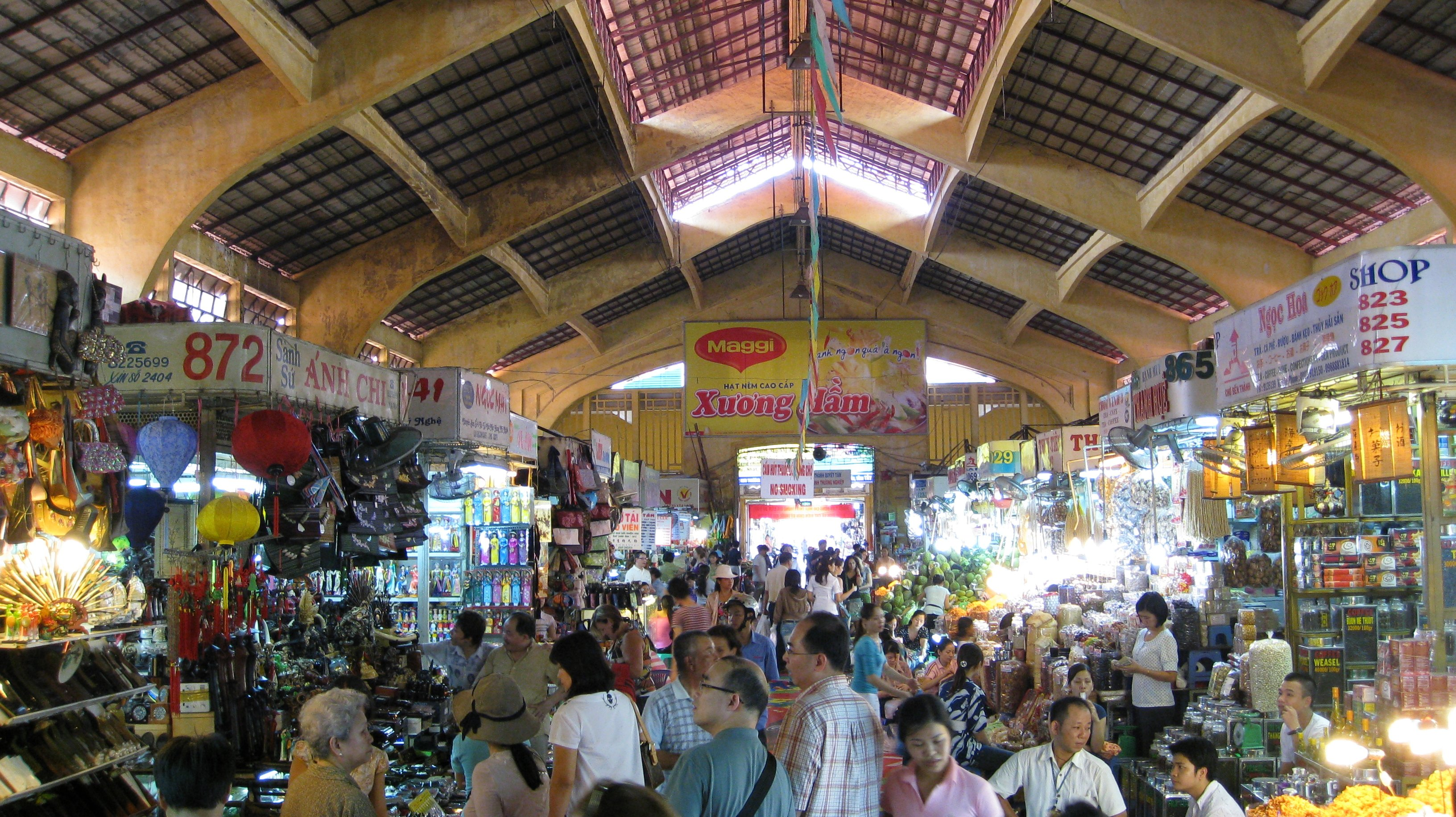 Ho Chi Minh city, Vietnam